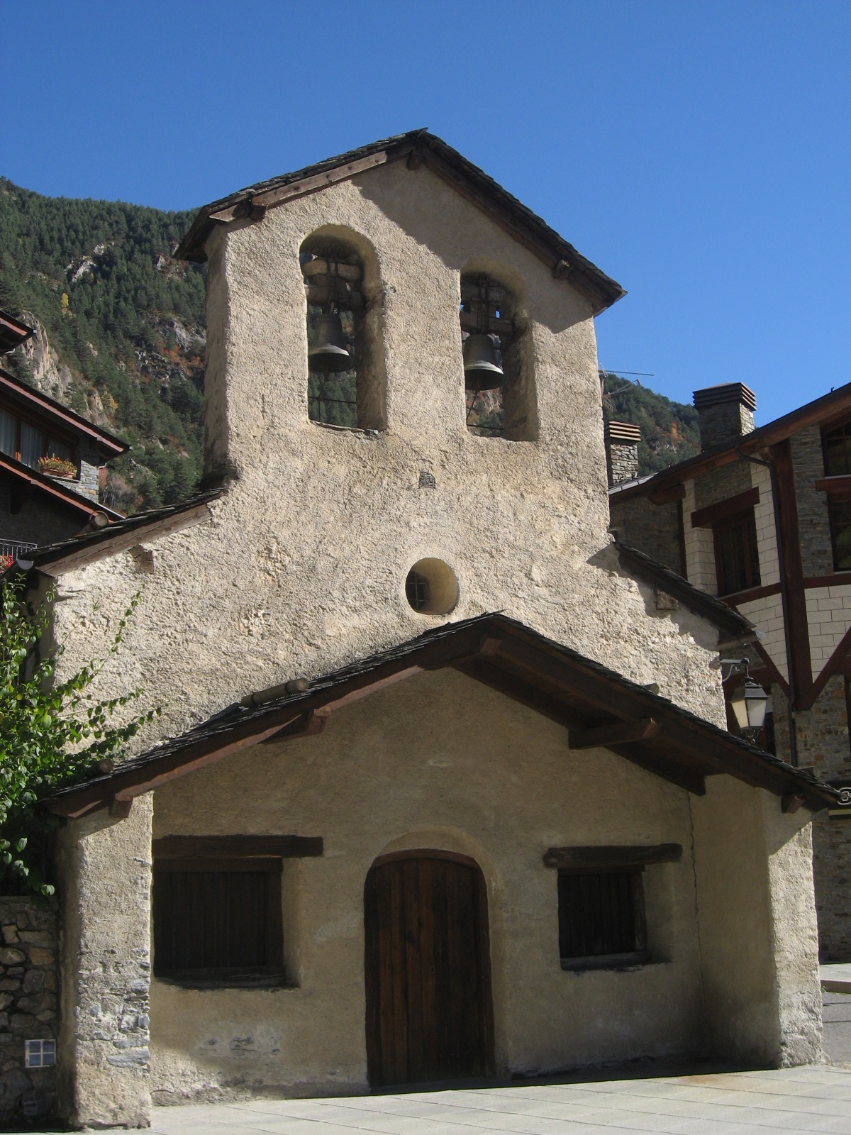 Església de Sant Romà d'Erts